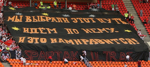 Перфоманс "Мы выбрали этот путь. Идем по нему. И это нам нравится! Spartak Ultras". 2011 год